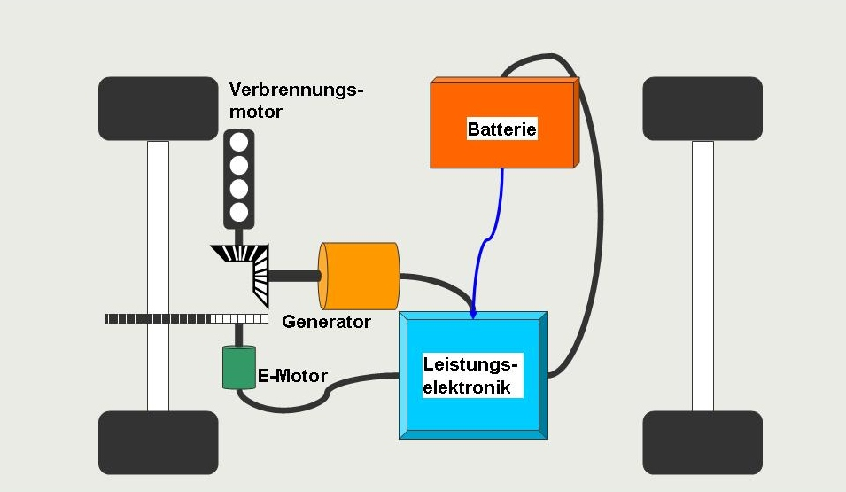 Systemstruktur eines seriellen Hybridantriebs